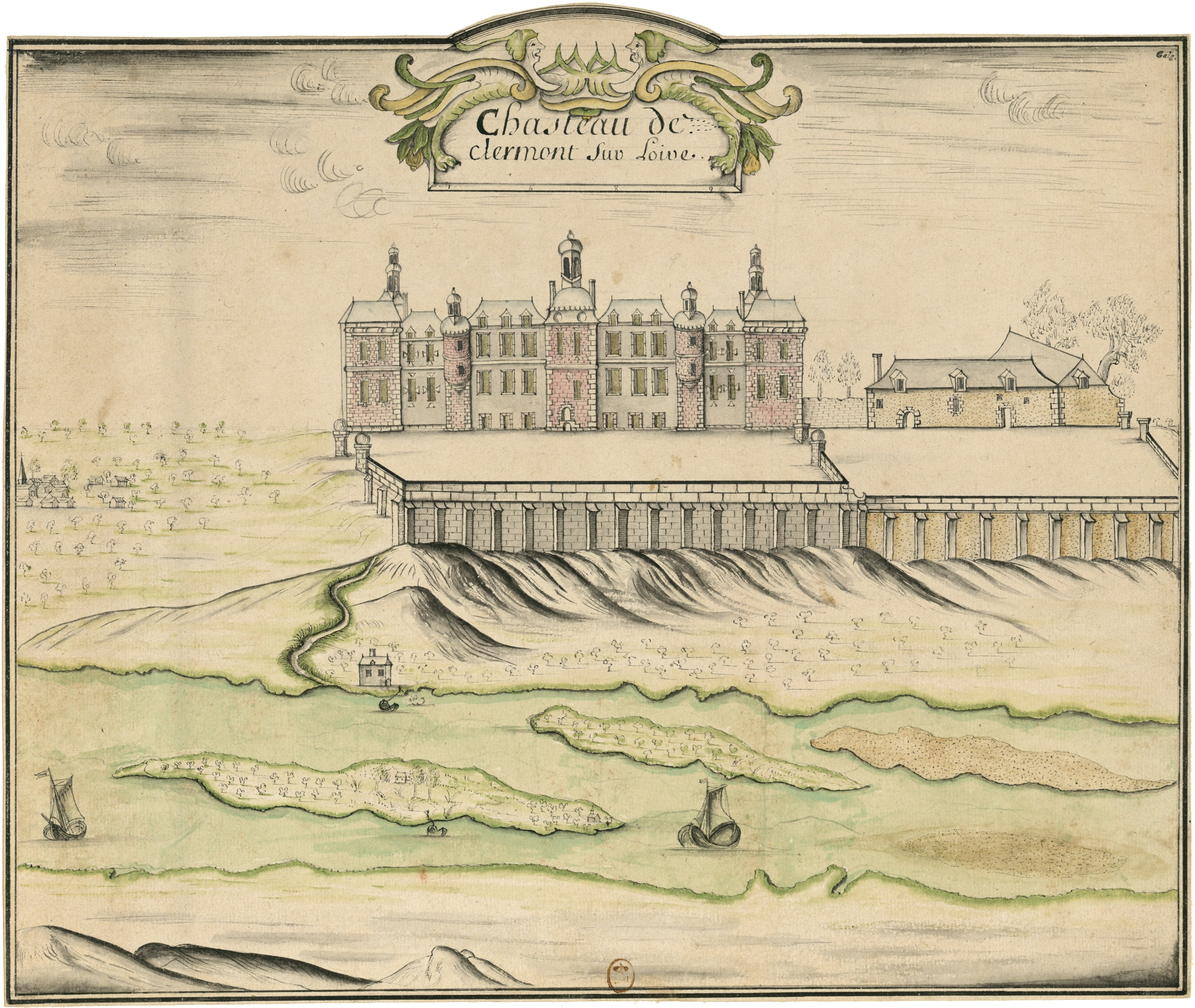 Aquarell des Schlosses Clermont in Le Cellier, Hauts-de-Seine